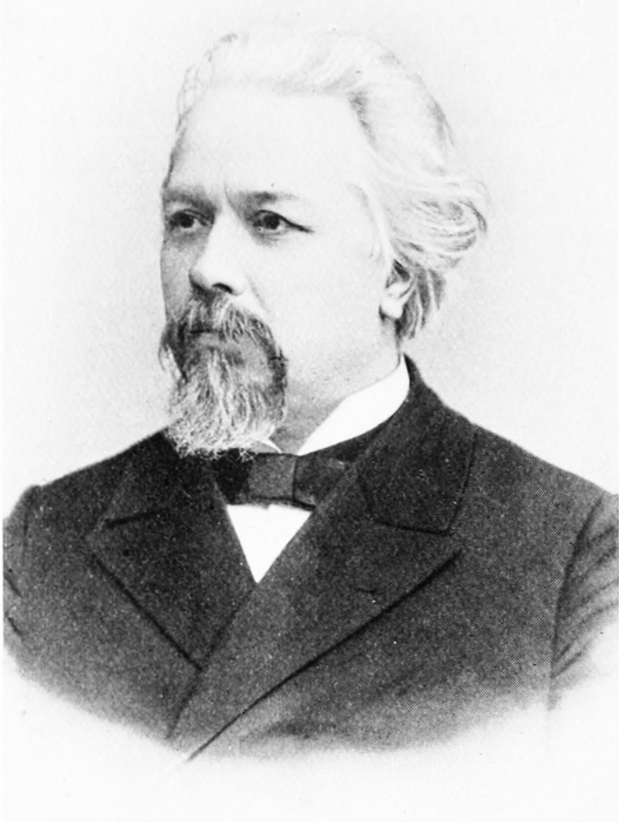 Alexander Karpinsky